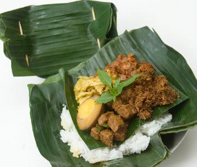 Nasi Bogan Picture